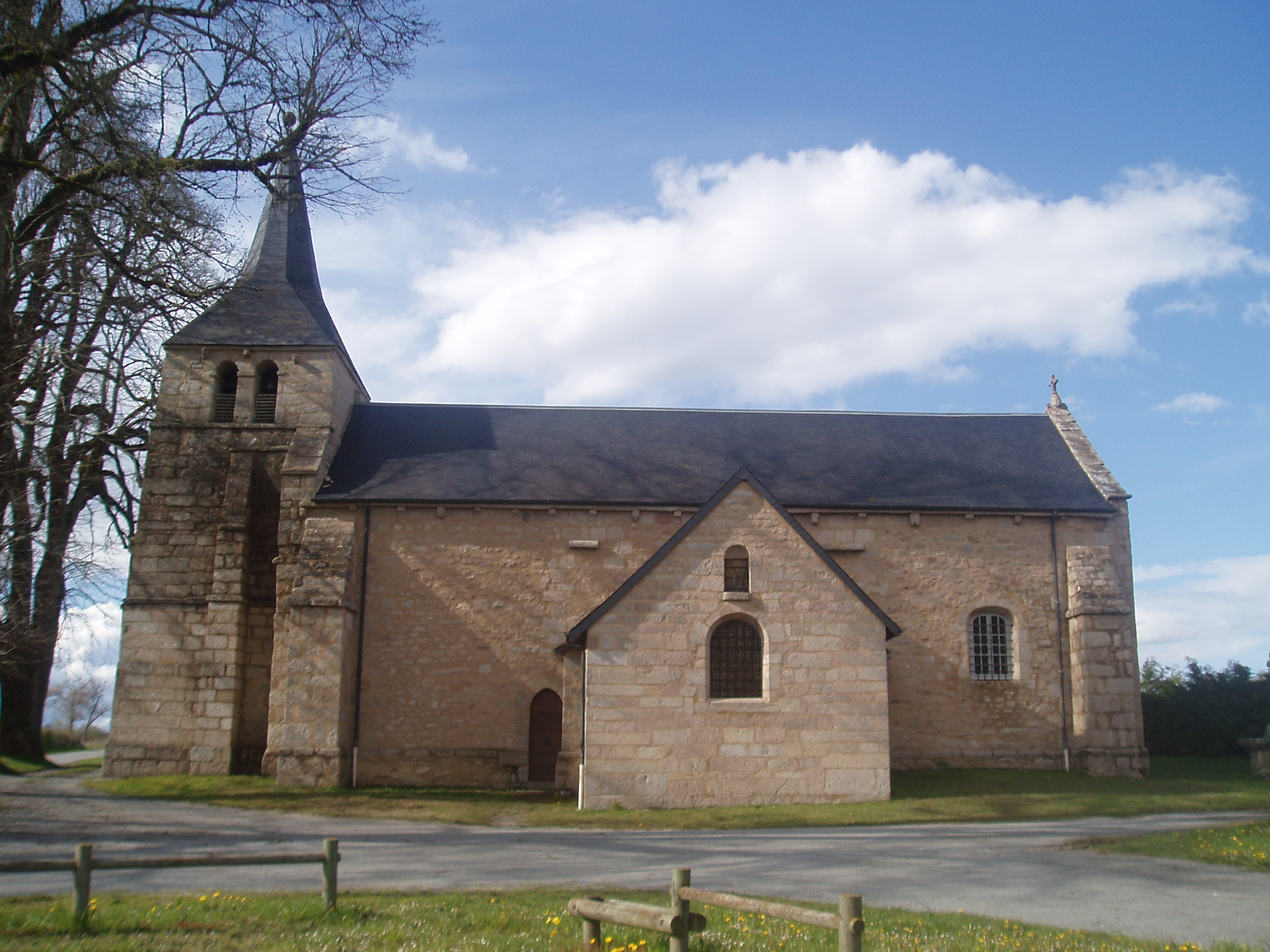 Eglise